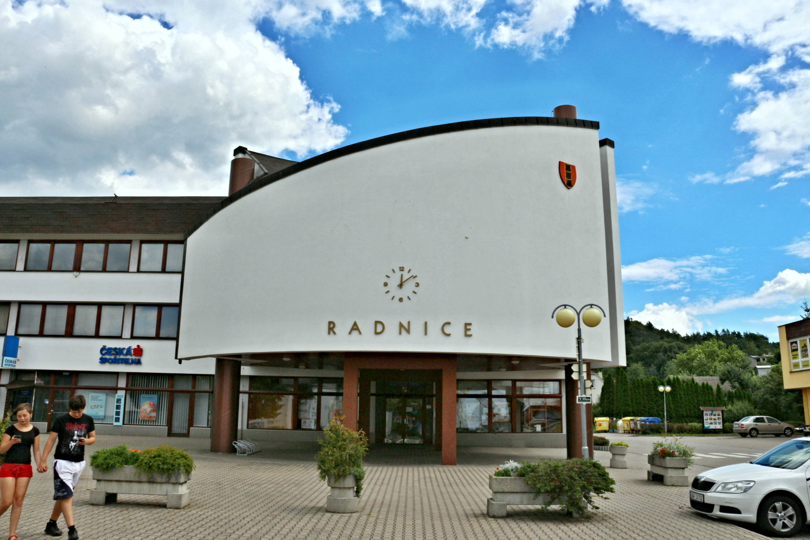 Náměstí Míru (Třemošnice)